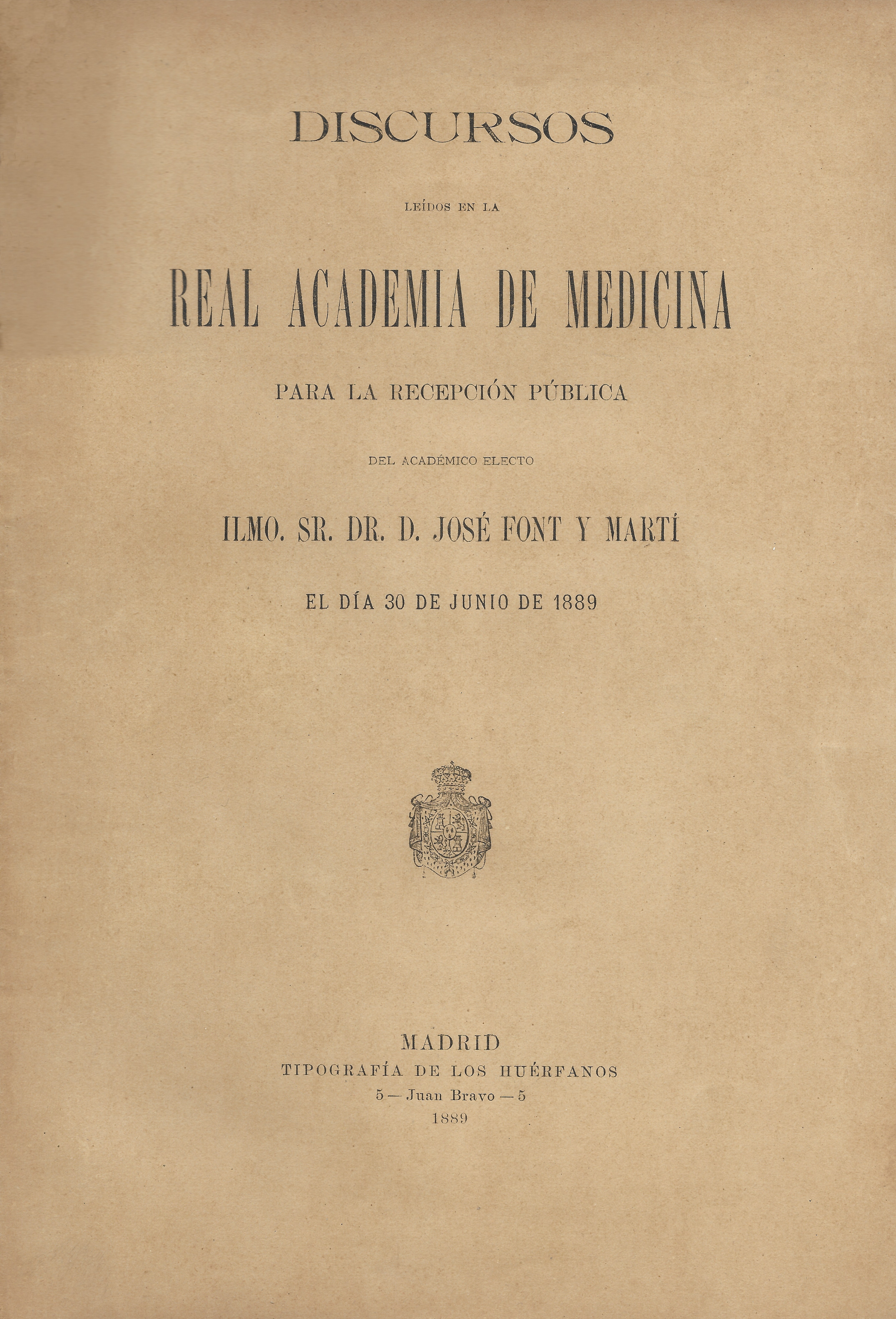 Portada del libro sobre el discurso de toma de posesión, de José Font y Martí, del sillón número 22 de la Real Academia de Medicina de España. Titulado "Cómo deben consignarse en las Farmacopeas oficiales los llamados medicamentos químicos" y publicado en Madrid en 1889.[1]